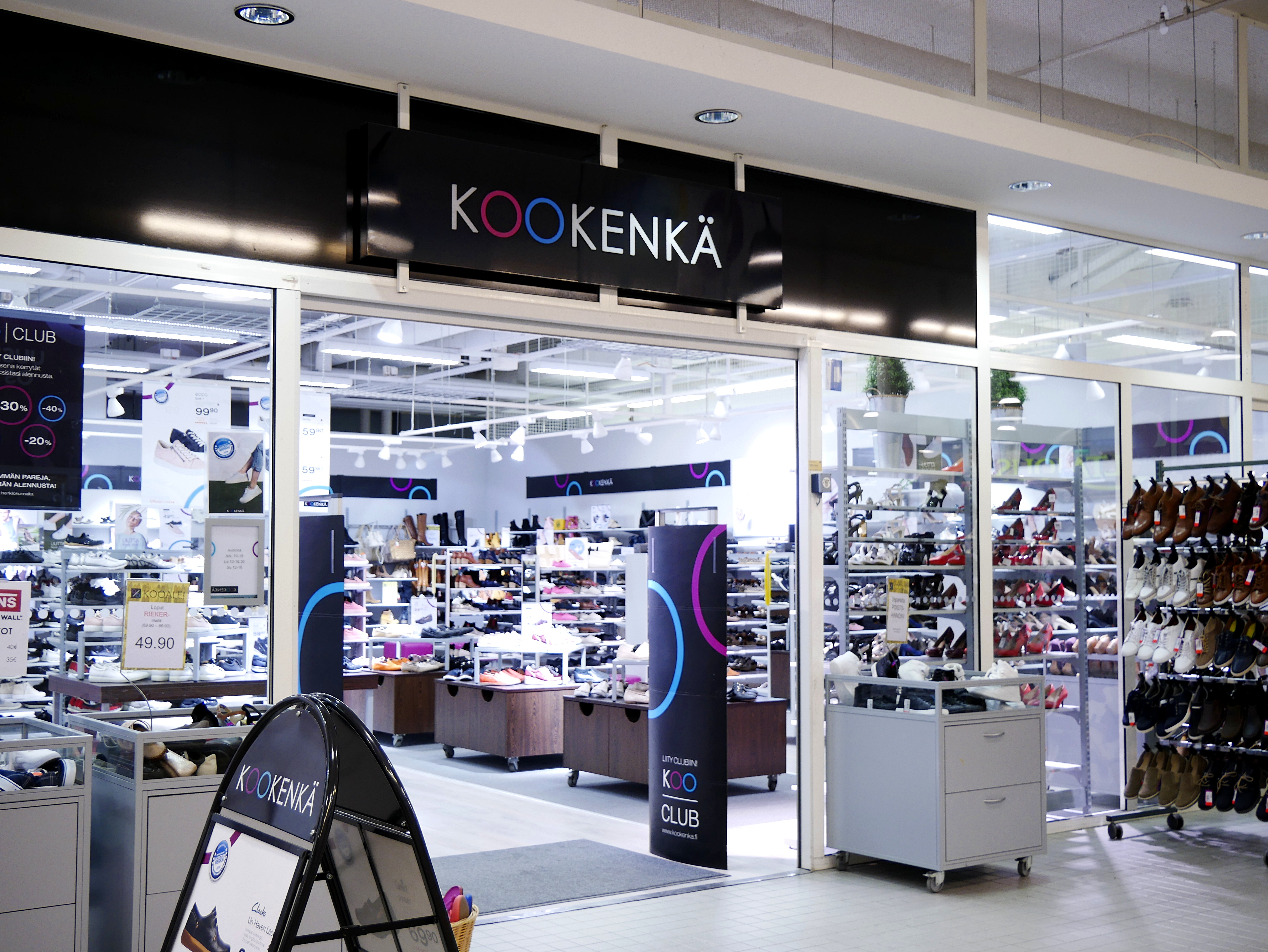 Kookengän myymälä Seinäjoella.